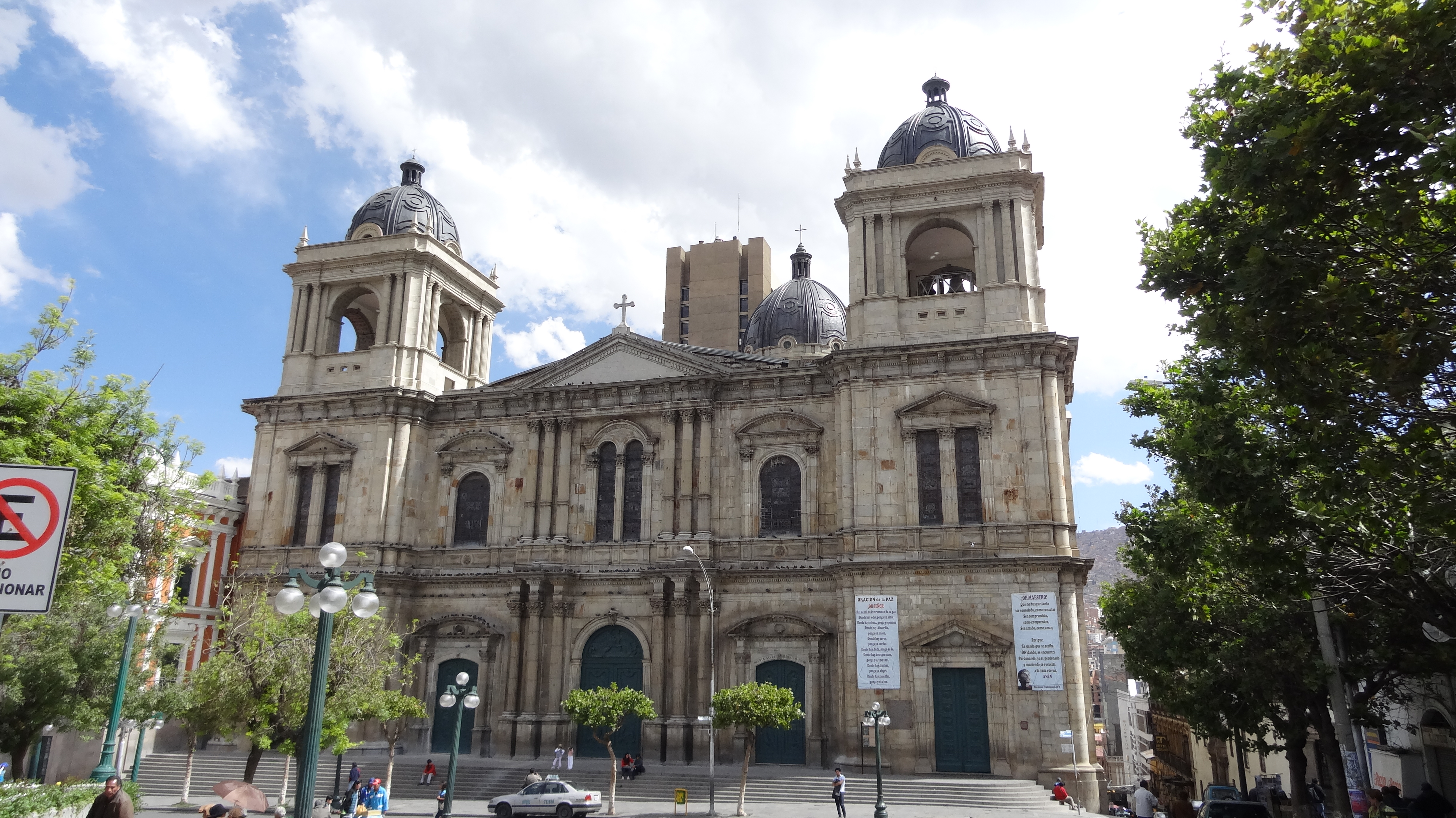 Vista frontal de la Catedral de Nuestra Señora de La Paz Ubicado en la Plaza Murillo